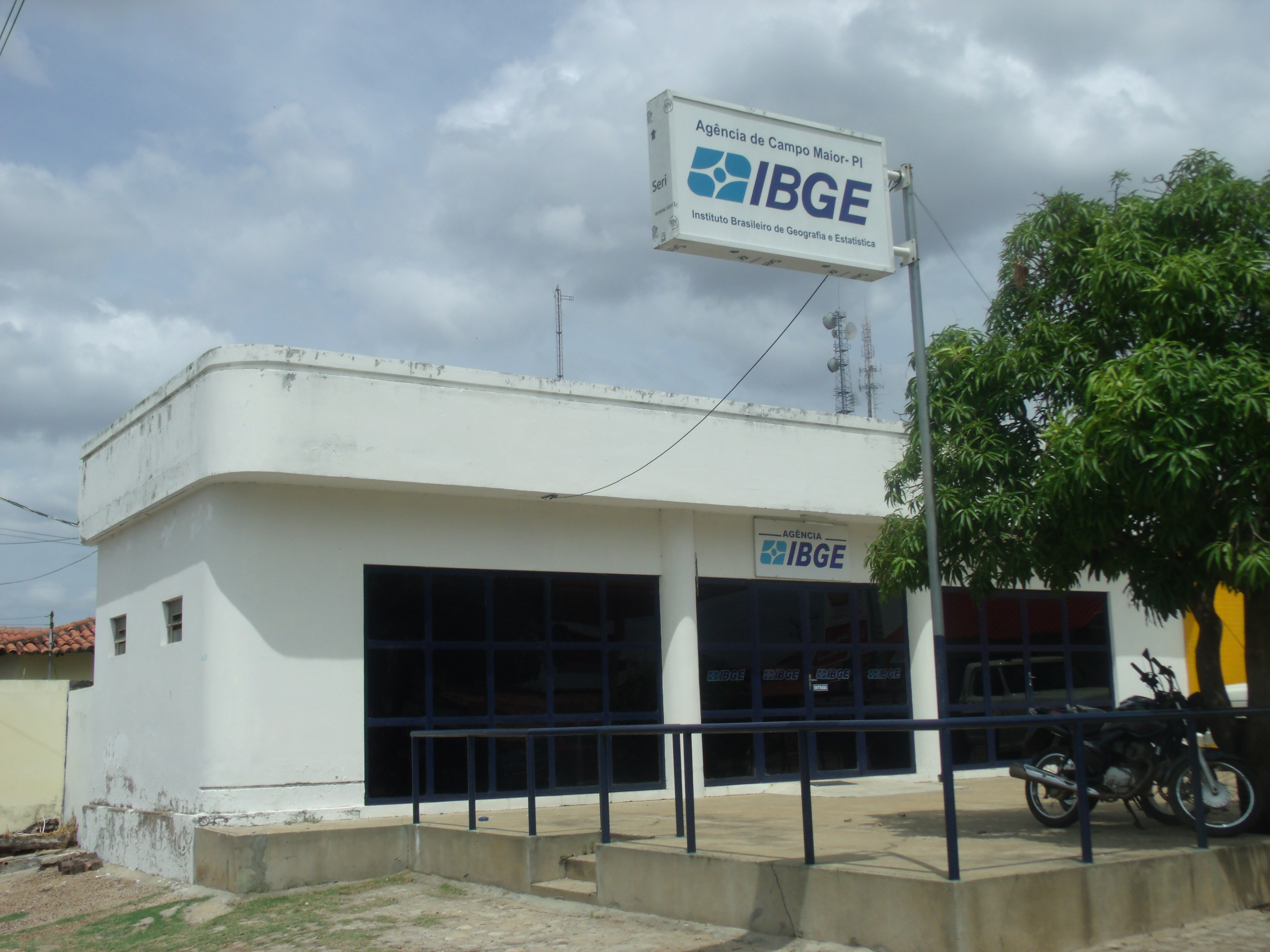 Agência do Instituto Brasileiro de Geografia e Estatística em Campo Maior, no Piauí.